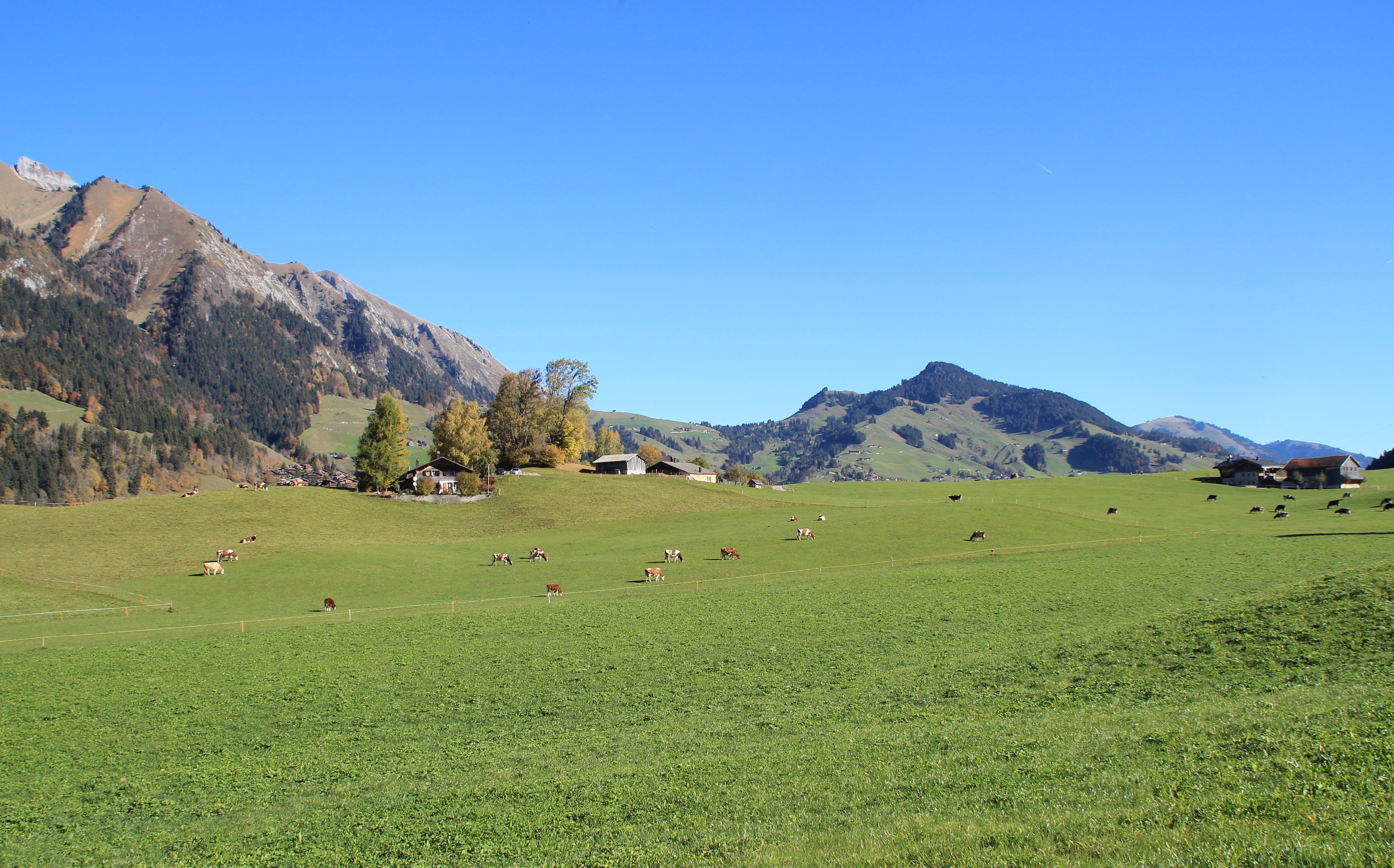 Waadtländer Voralpen bei Chateau d'Oex